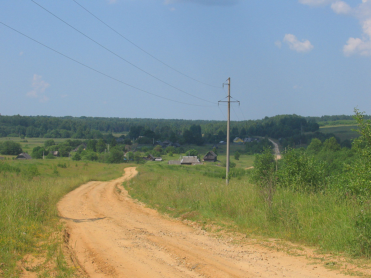 Фотография сделана летом 2006 года